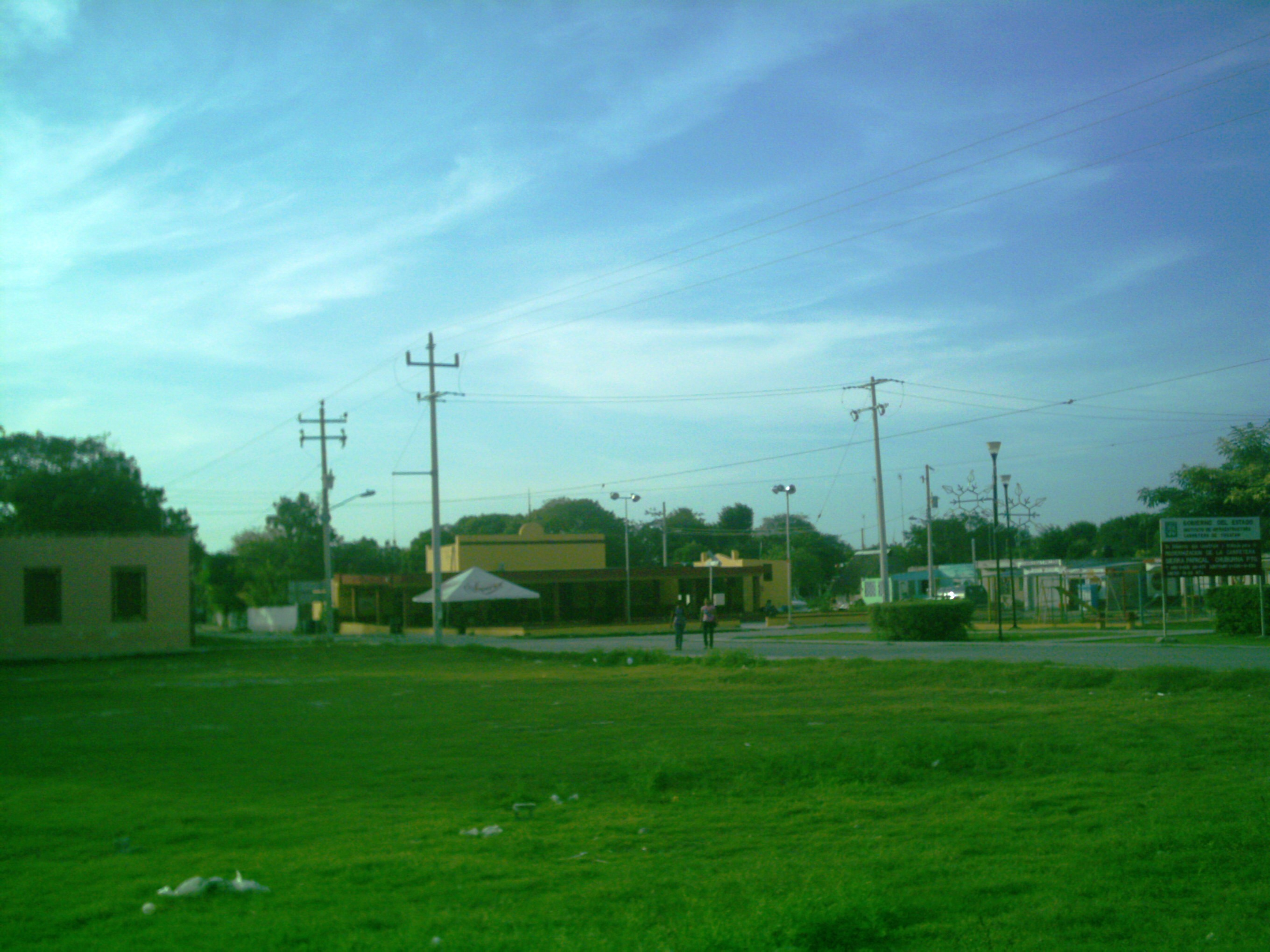 Parque principal de Sierra Papacal, Yucatán.